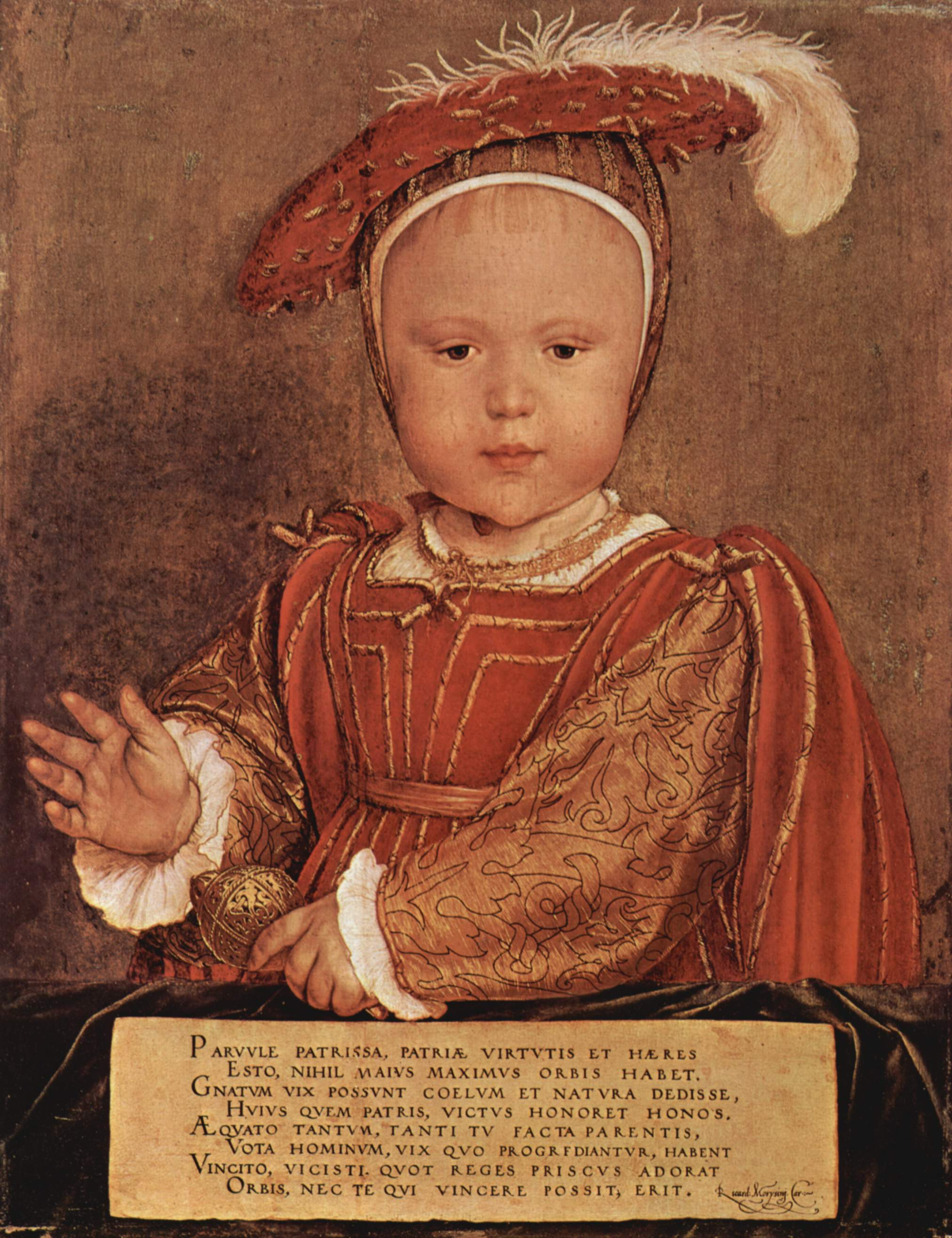 Porträt des Eduard VI. als Kind